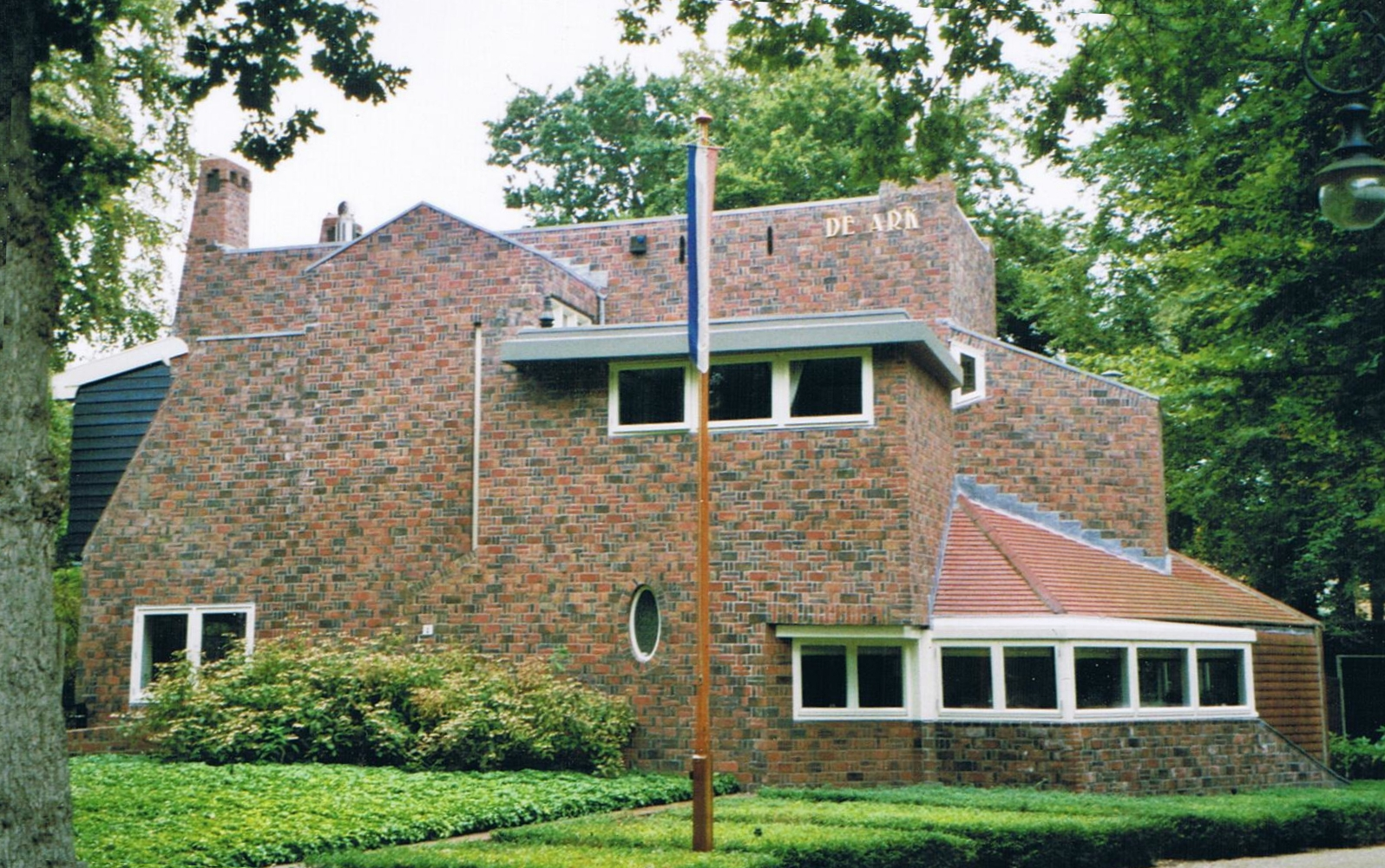 Bergen (NH), Park Meerwijk: Landhuis De Ark (J.F.Staal, 1918)